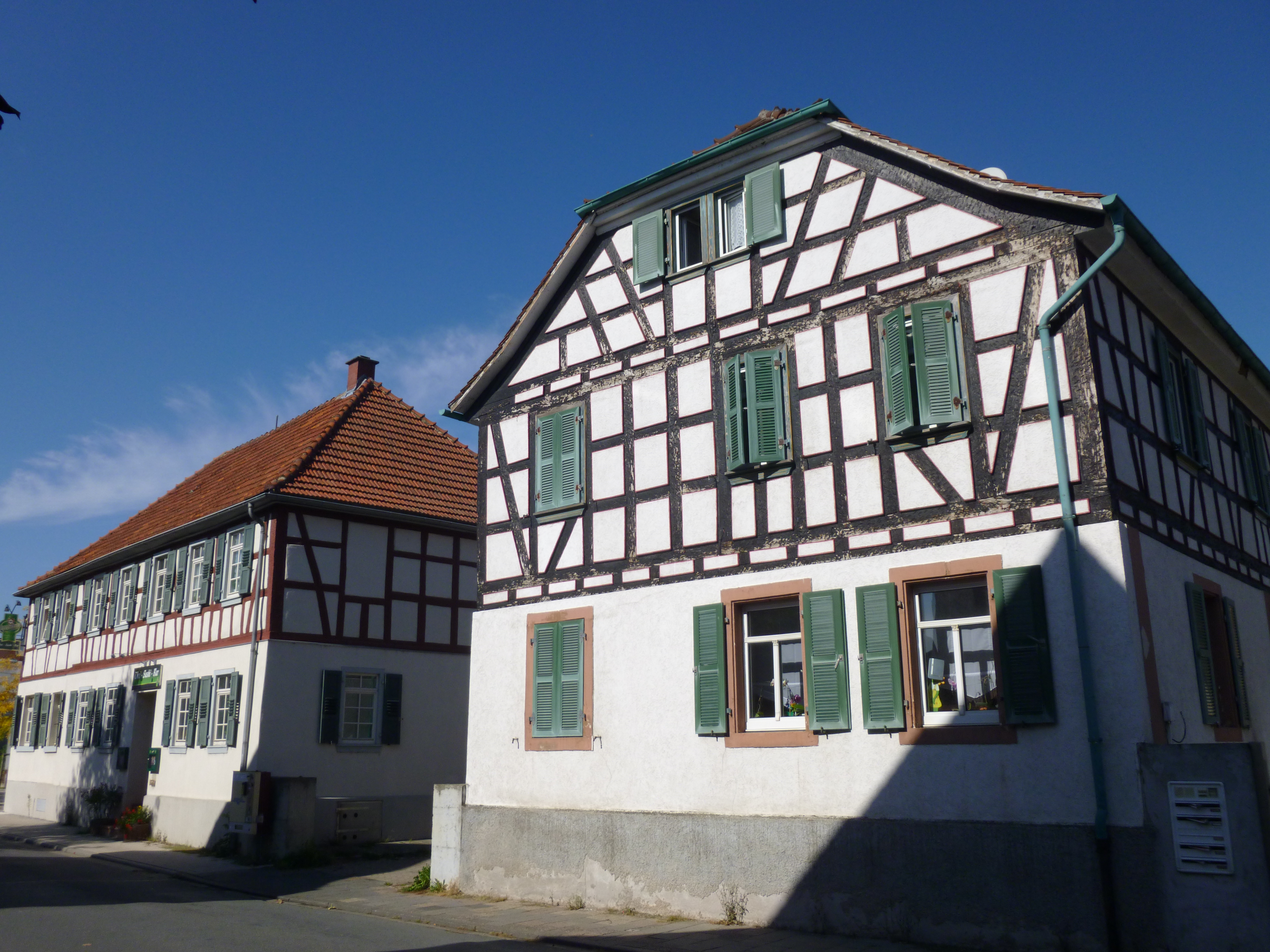 historiaj trabfakaj domoj Messeler Straße 2 kaj 4 en Darmstadt-Arheilgen